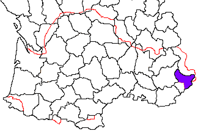 Mapa del comtat de Niça, elaboració pròpia —Walden69 21:08, 14 January 2006 (UTC)